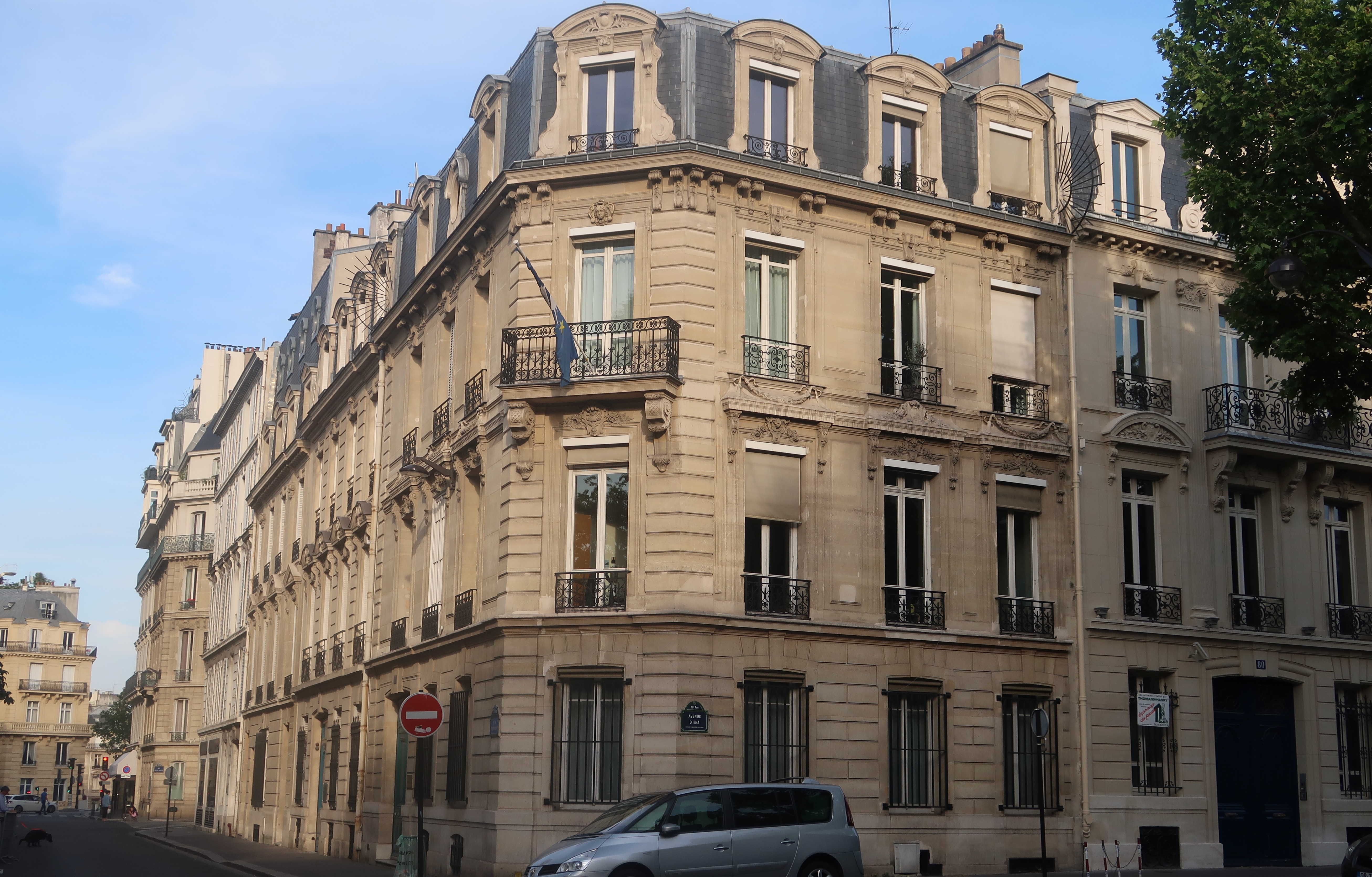 Siège du Centre international de hautes études agronomiques méditerranéennes (CIHEAM), n°11 rue Newton, au croisement avec l'avenue d'Iéna (Paris, 16e).